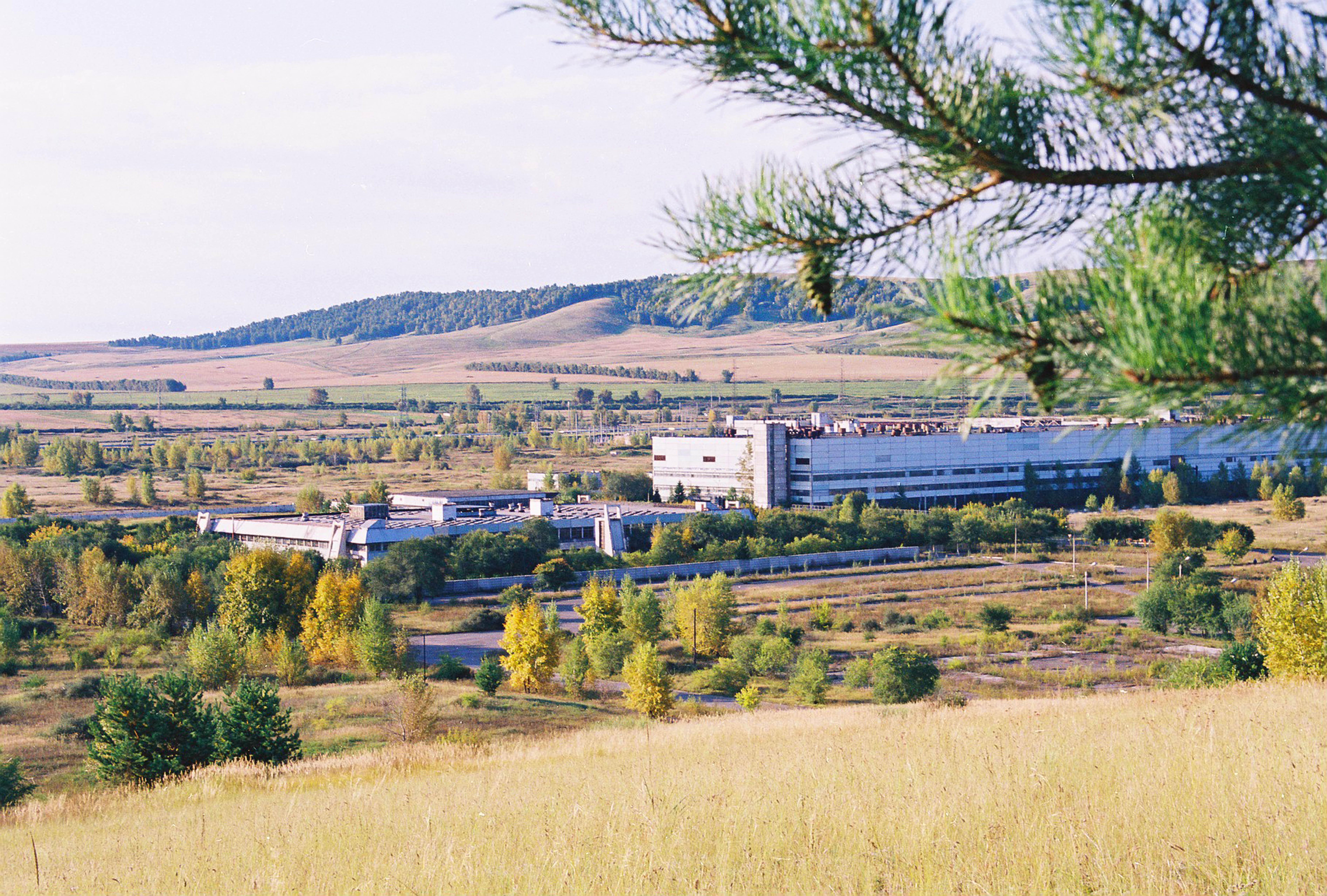 Производственные здания Минусинского Электрокомплекса